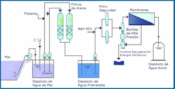 ALDERANTZIZKO OSMOSISA